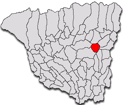 Categorie:Hărţi ale judeţului Gorj